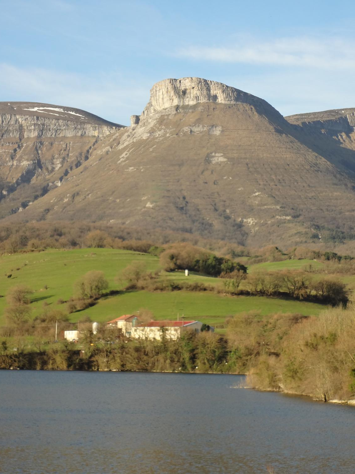 Maroñoko urtegia